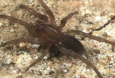 female Itatsina praticola from Okinawa.